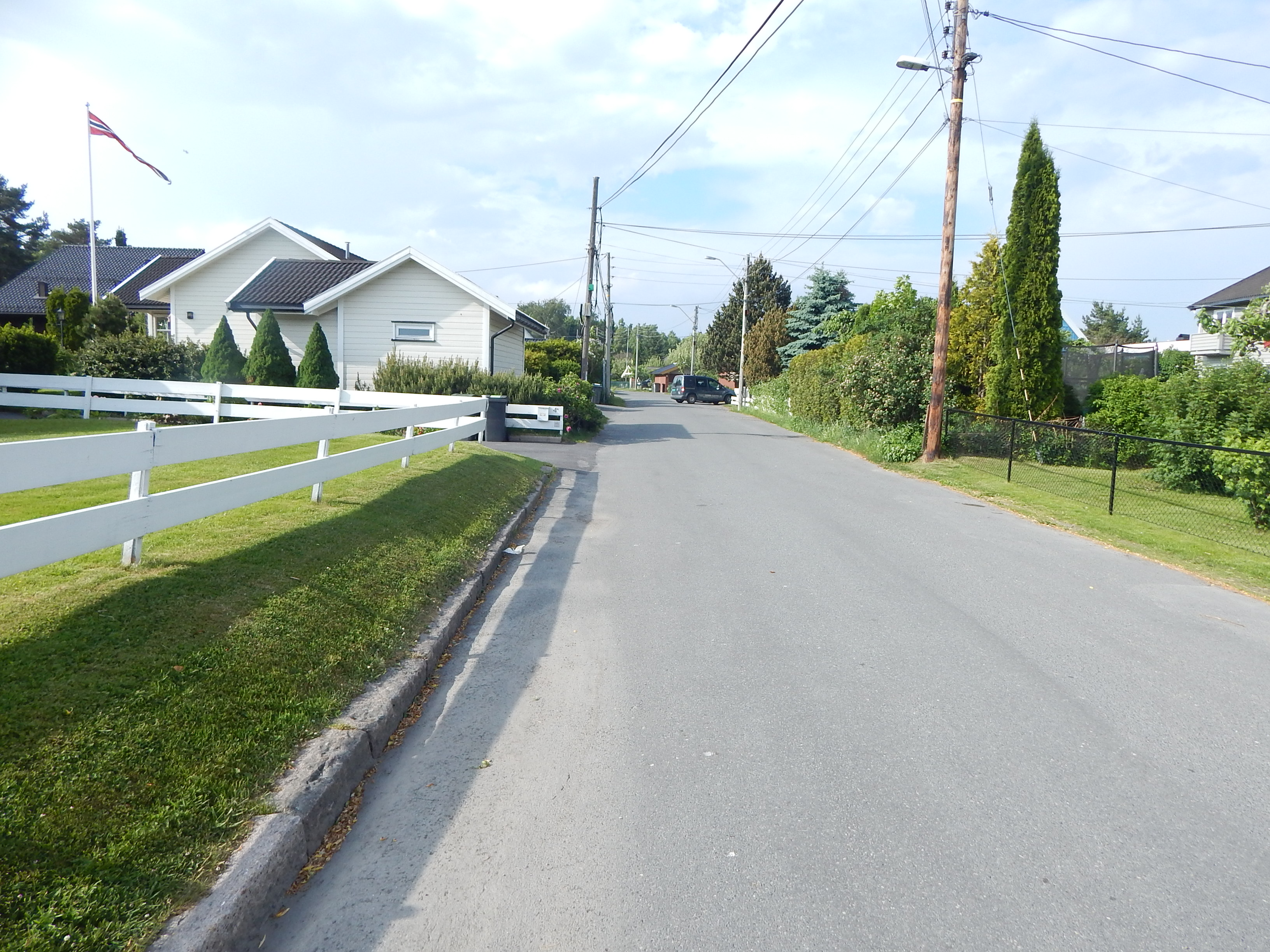 Vestengsvingen